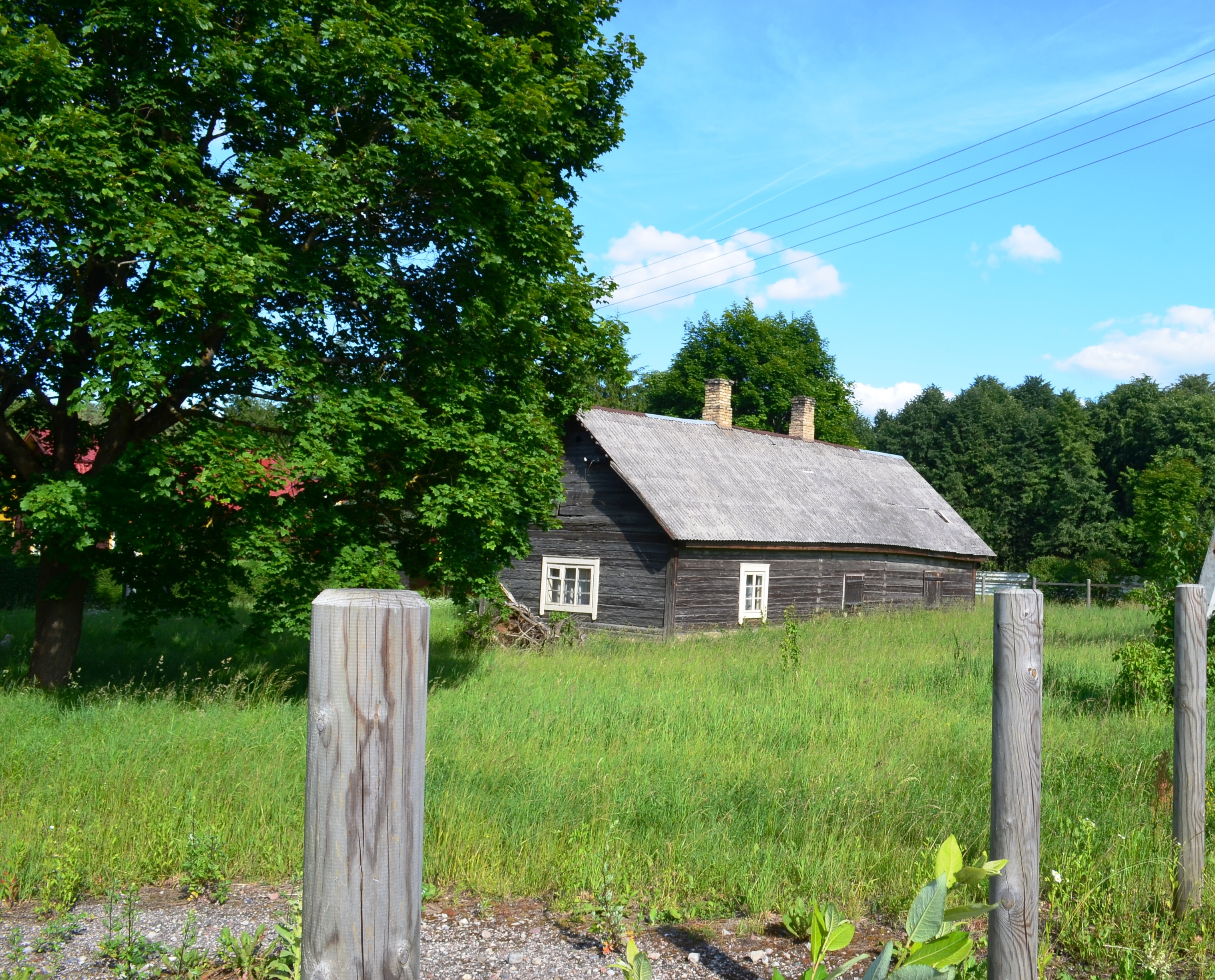 Miškonys, Vilniaus raj.